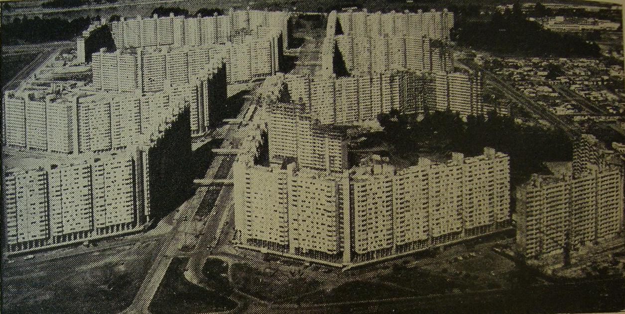 El Conjunto Lugano 1 y 2, luego llamado General Manuel Savio, aún en su primera etapa de construcción (hacia 1970). Se encuentra en el barrio de Villa Lugano, en Buenos Aires, Argentina.